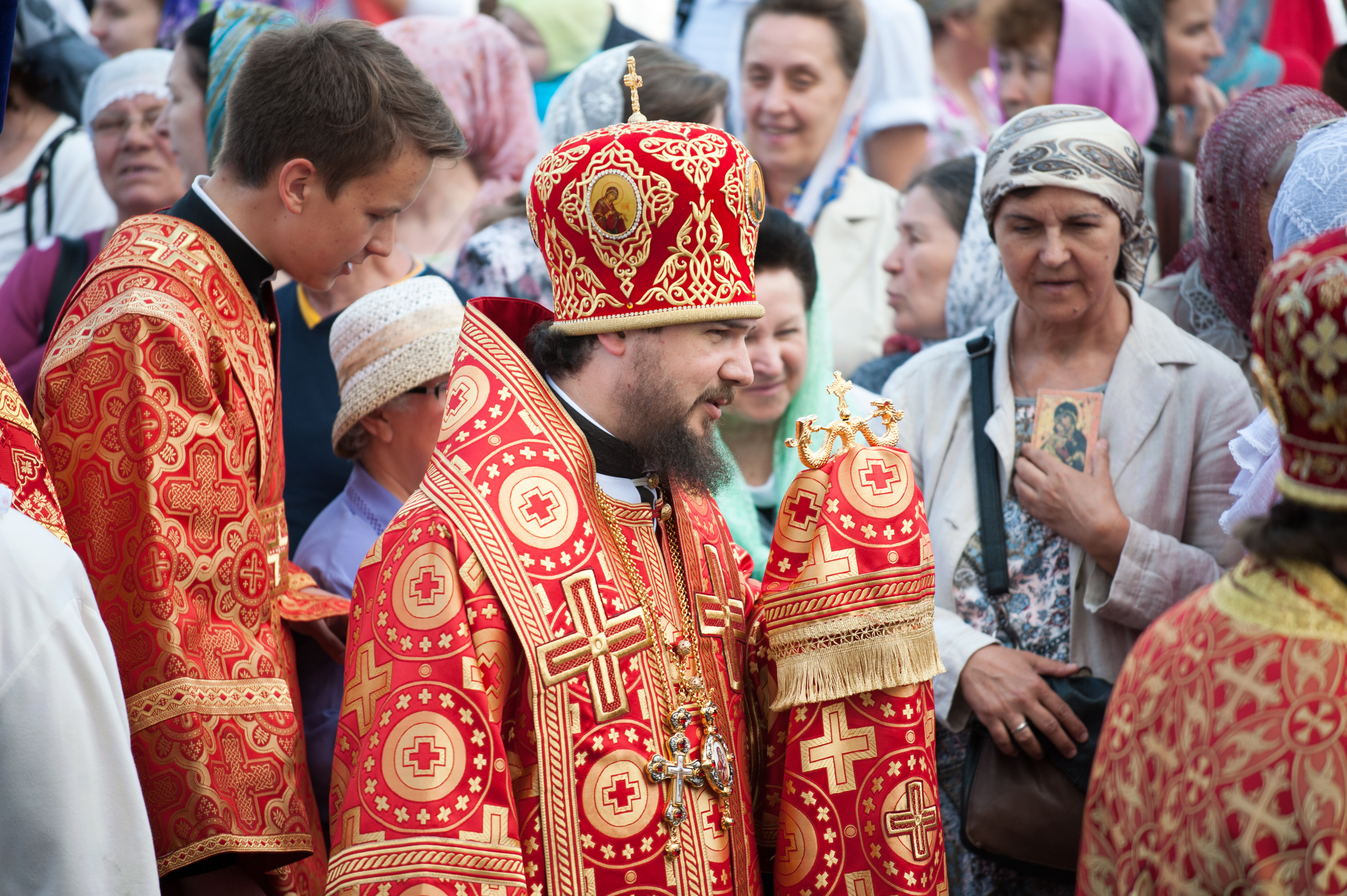 24 мая 2016 г. Астрахань